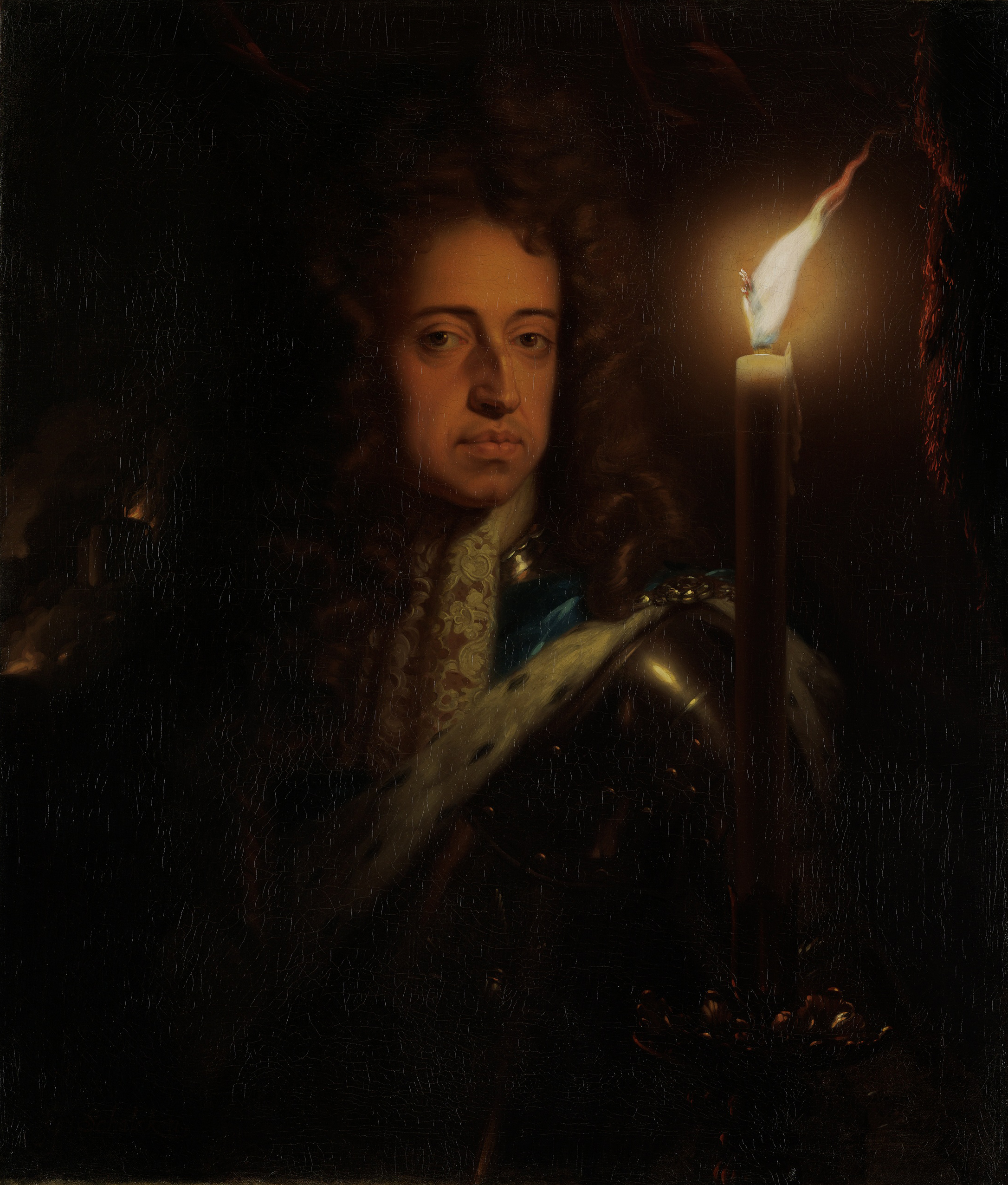 Portret van Willem III (1650-1702), prins van Oranje, stadhouder en sedert 1689 koning van Engeland. Buste in wapenrusting bij een brandende kaars.; Godfried Schalcken (1643–1706), olieverf op doek, ca. 1692-1697